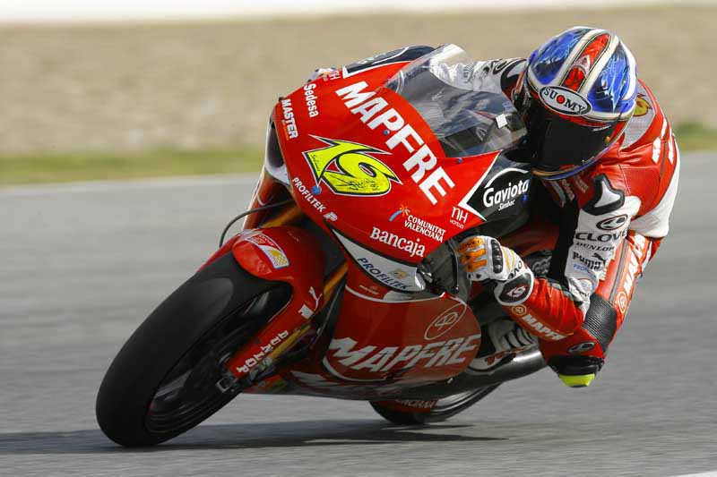 Alvaro Bautista en IRTA Jerez Test 2008